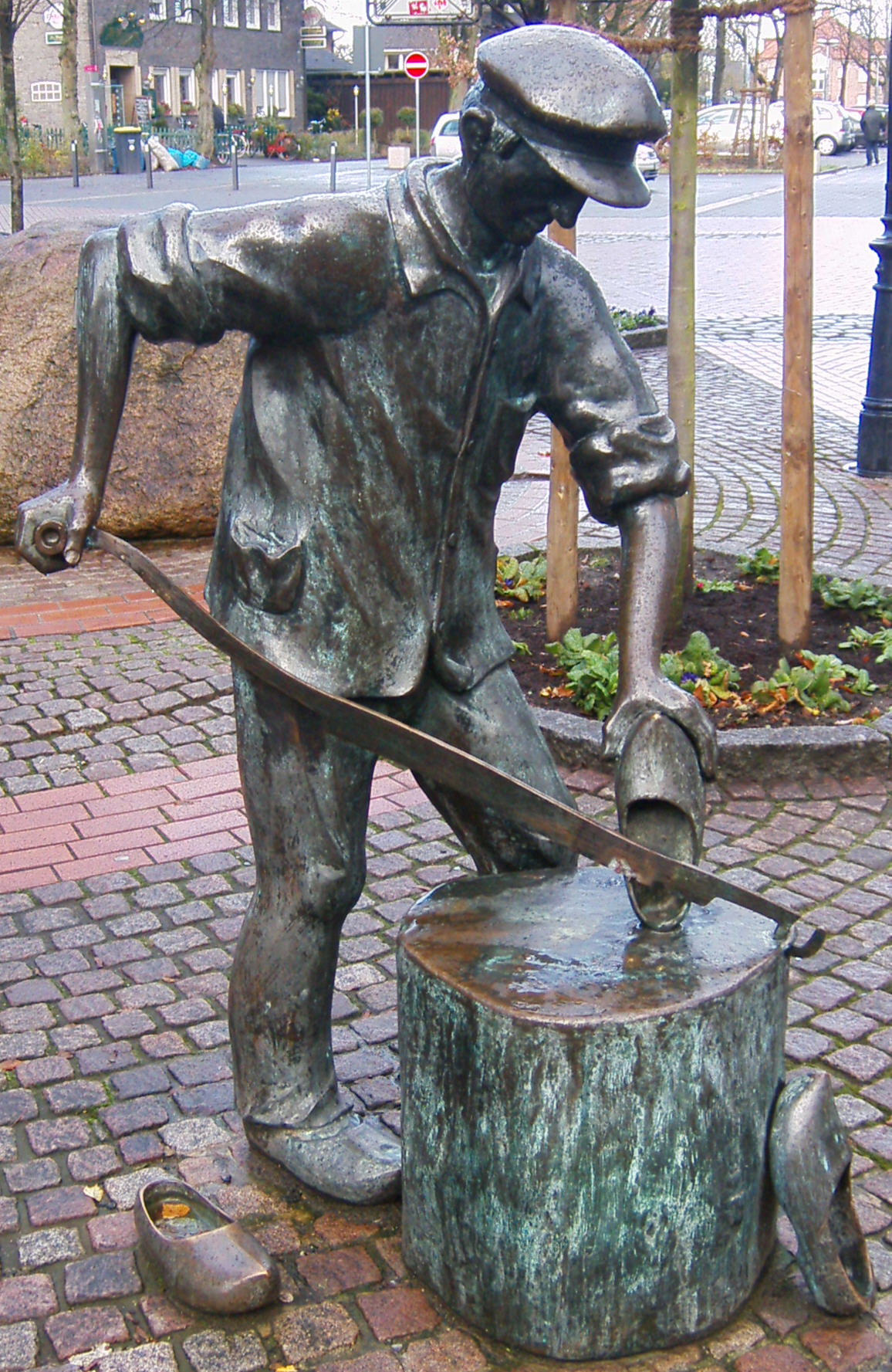 Holzschuhmacherdenkmal in Neuenkirchen. Bronzeplastik von Werner Bruning aus Rheine; Neuenkirchen (Kreis Steinfurt); Heyeröder Platz